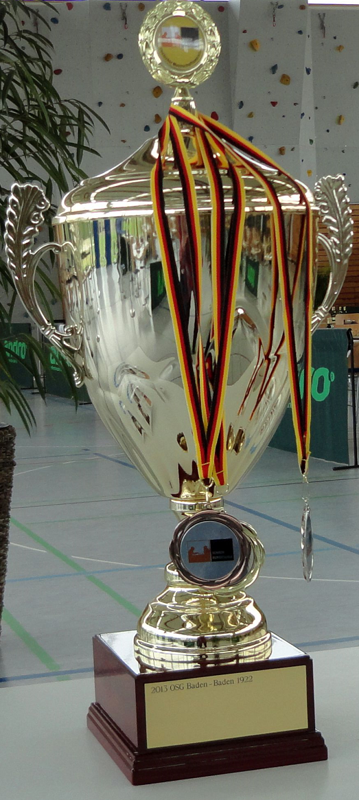 Pokal der Deutschen Schachbundesliga (mit Gravur 2013 OSG Baden-Baden 1922), aufgenommen beim Finale der Schachbundesliga 2013/2014 in Eppingen.